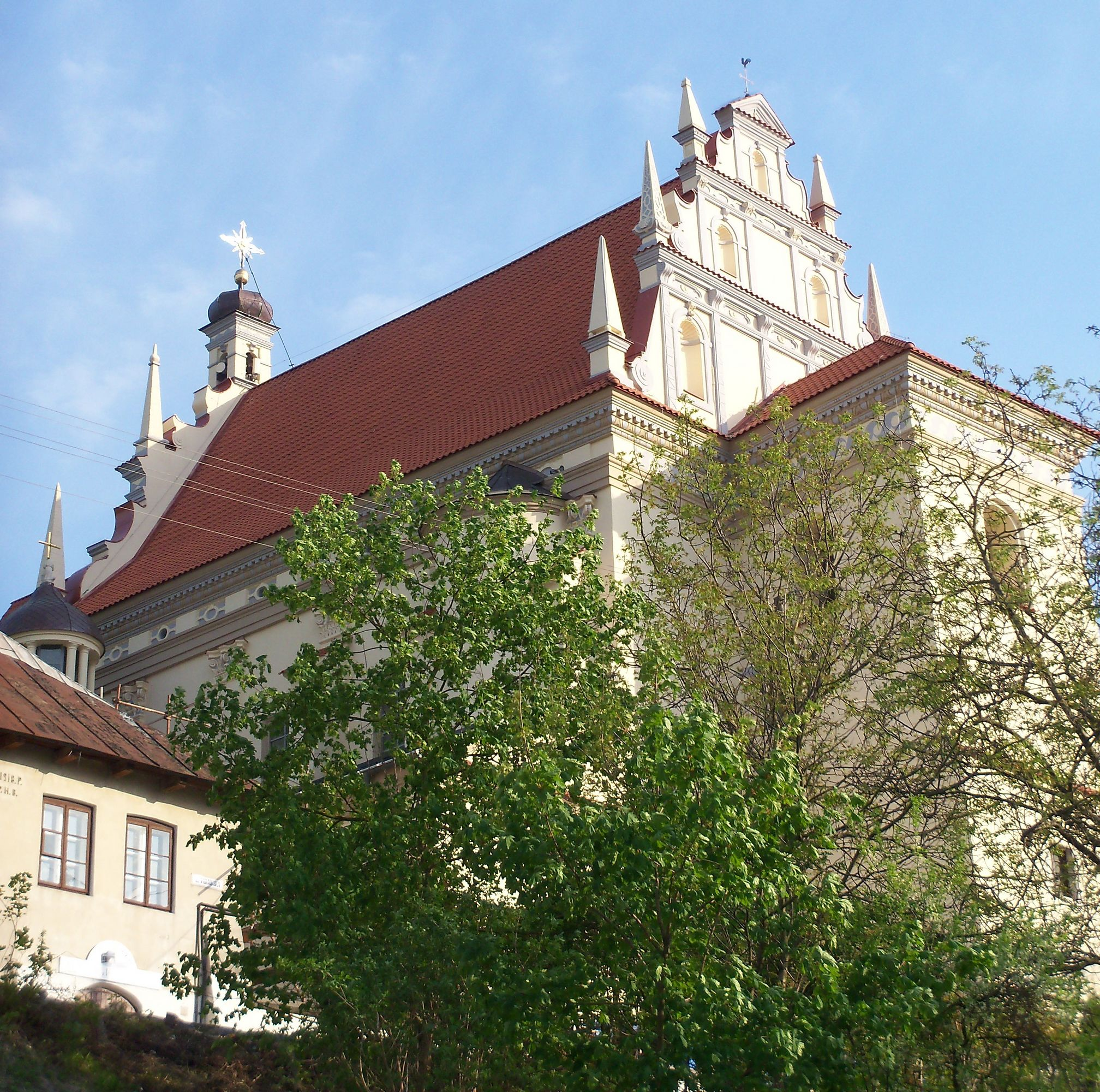 Kazimierz Dolny - zespół kościoła: kościół par. p.w. śś. Jana Chrzciciela i Bartłomieja